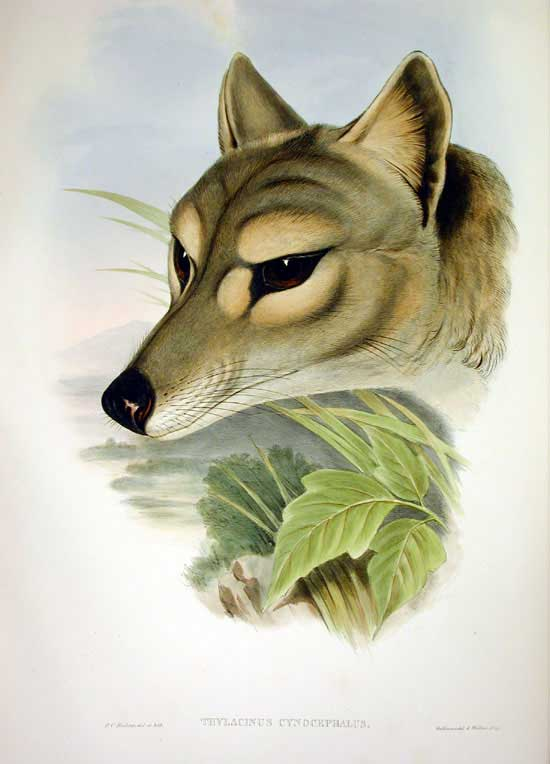 Thylacinus cynocephalus